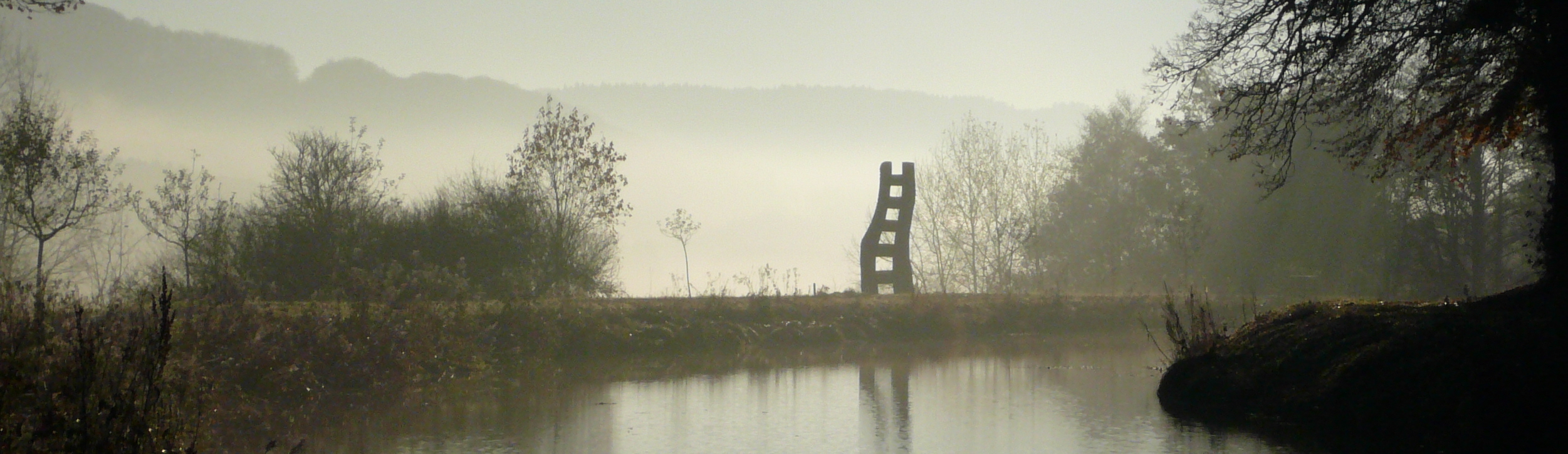 Panoramic picture of the old "Ludwigkanal" in Berg bei Neumarkt i.d. OPf., Bavaria, Germany with Granite Sculptur "Himmelsleiter" from Huber Maier